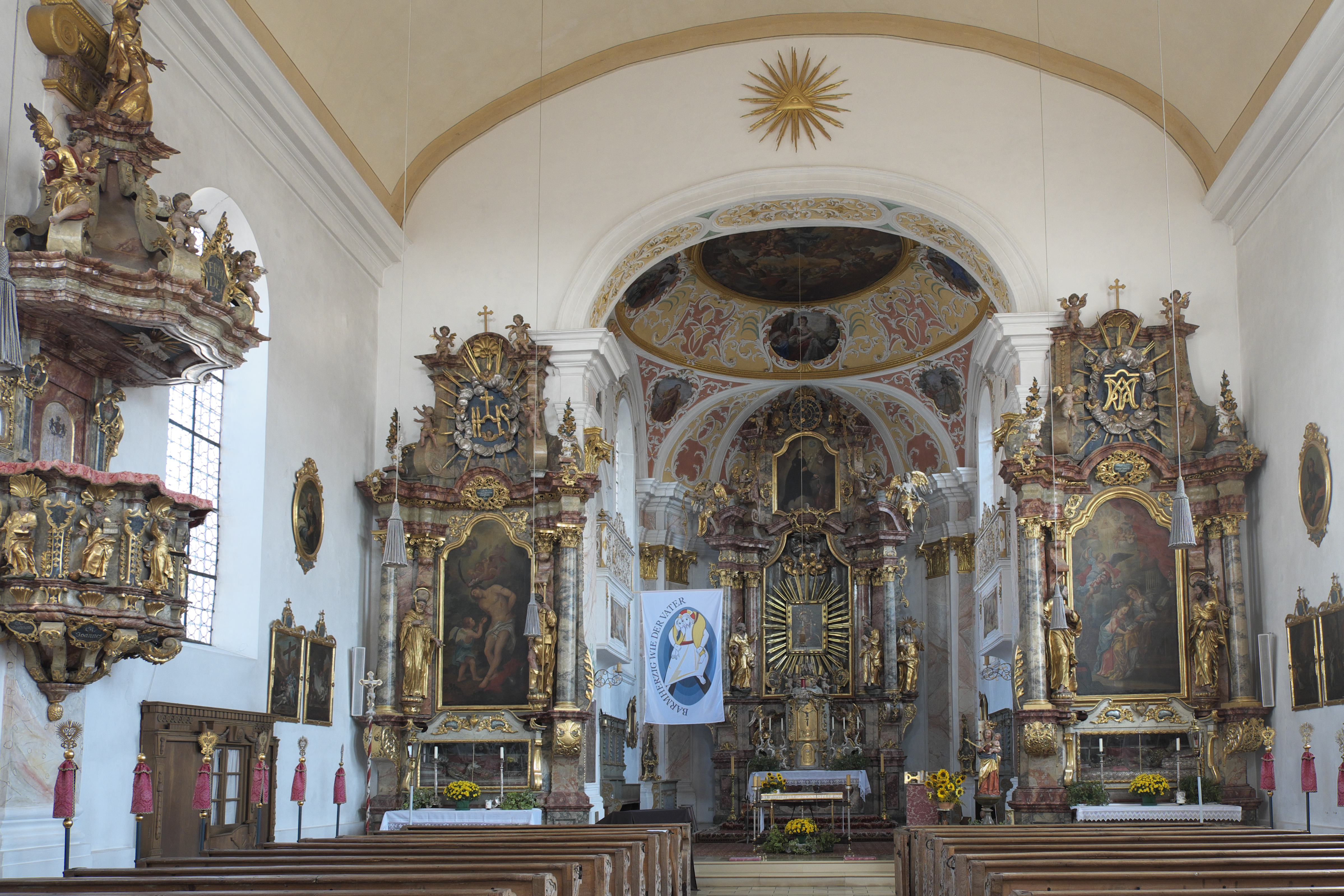 Katholische Pfarrkirche Sankt Peter und Paul in Oberigling (Igling) im Landkreis Landsberg am Lech (Bayern/Deutschland), Innenraum